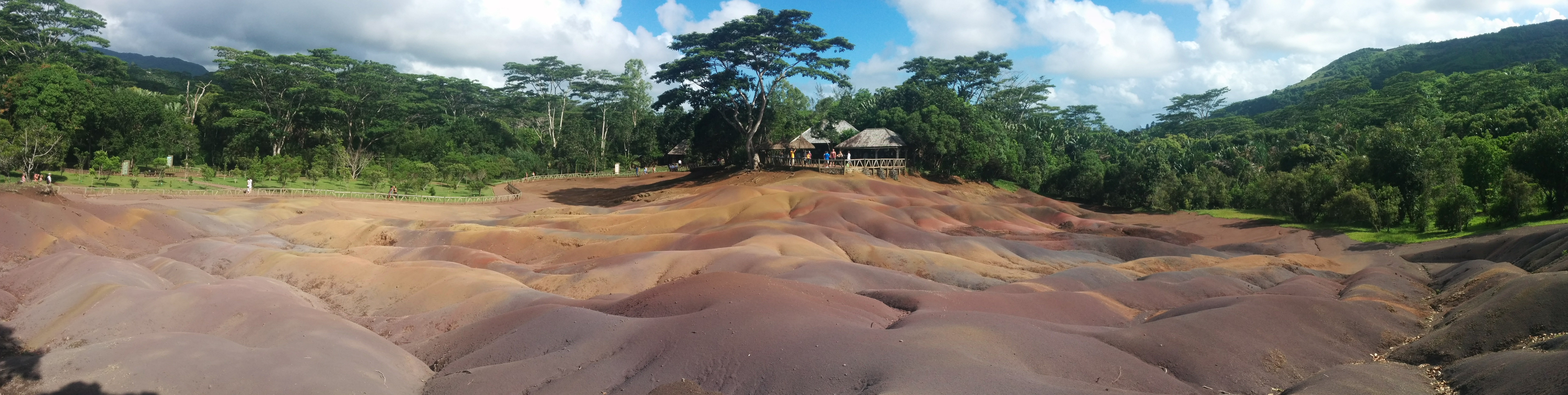 Les Terres des Sept Couleurs à Chamarel, Île Maurice.